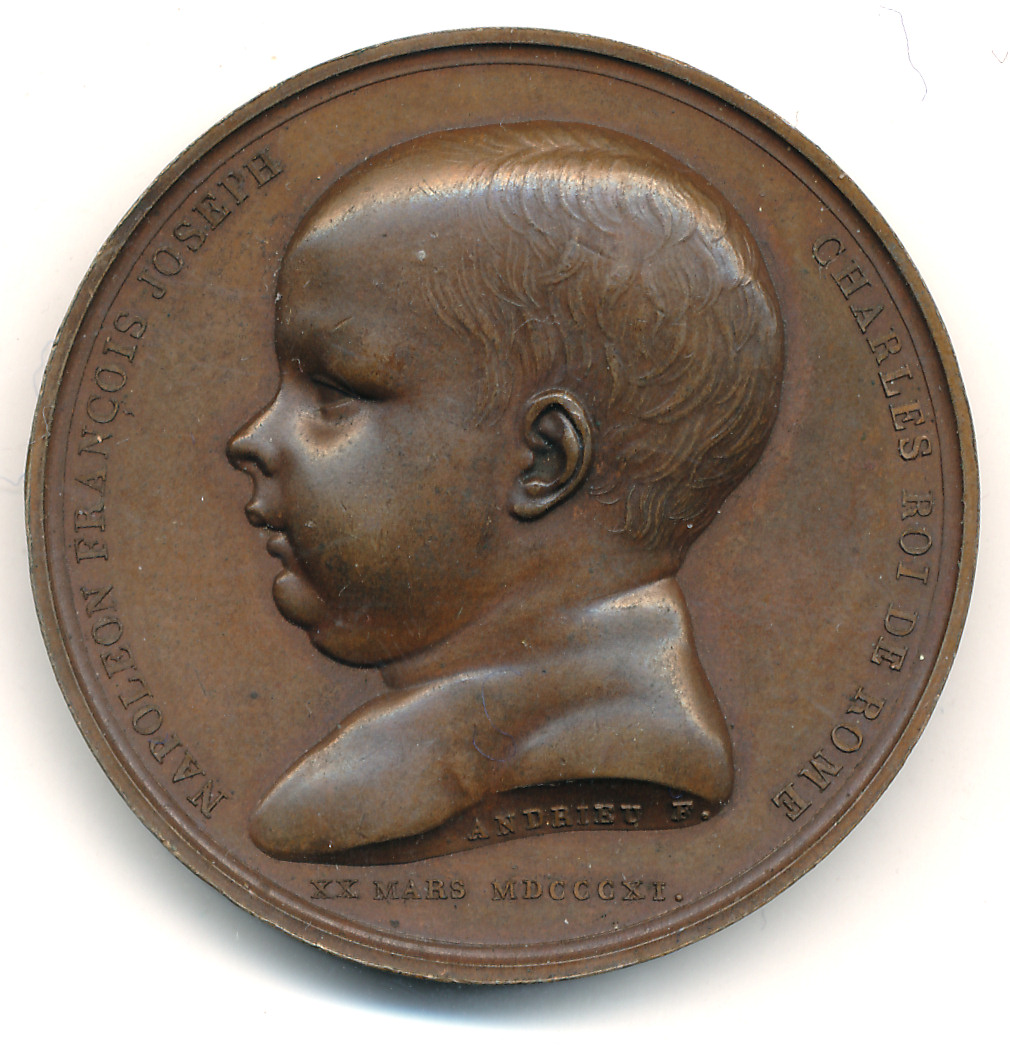 Médaille à l'effigie de Napoléon et Marie Louise, gravée par Andrieu d'après un dessin de Denon. Bronze, diamètre 41 mm, 1811 Revers gravé par Andrieu, pour la naissance du Roi de Rome